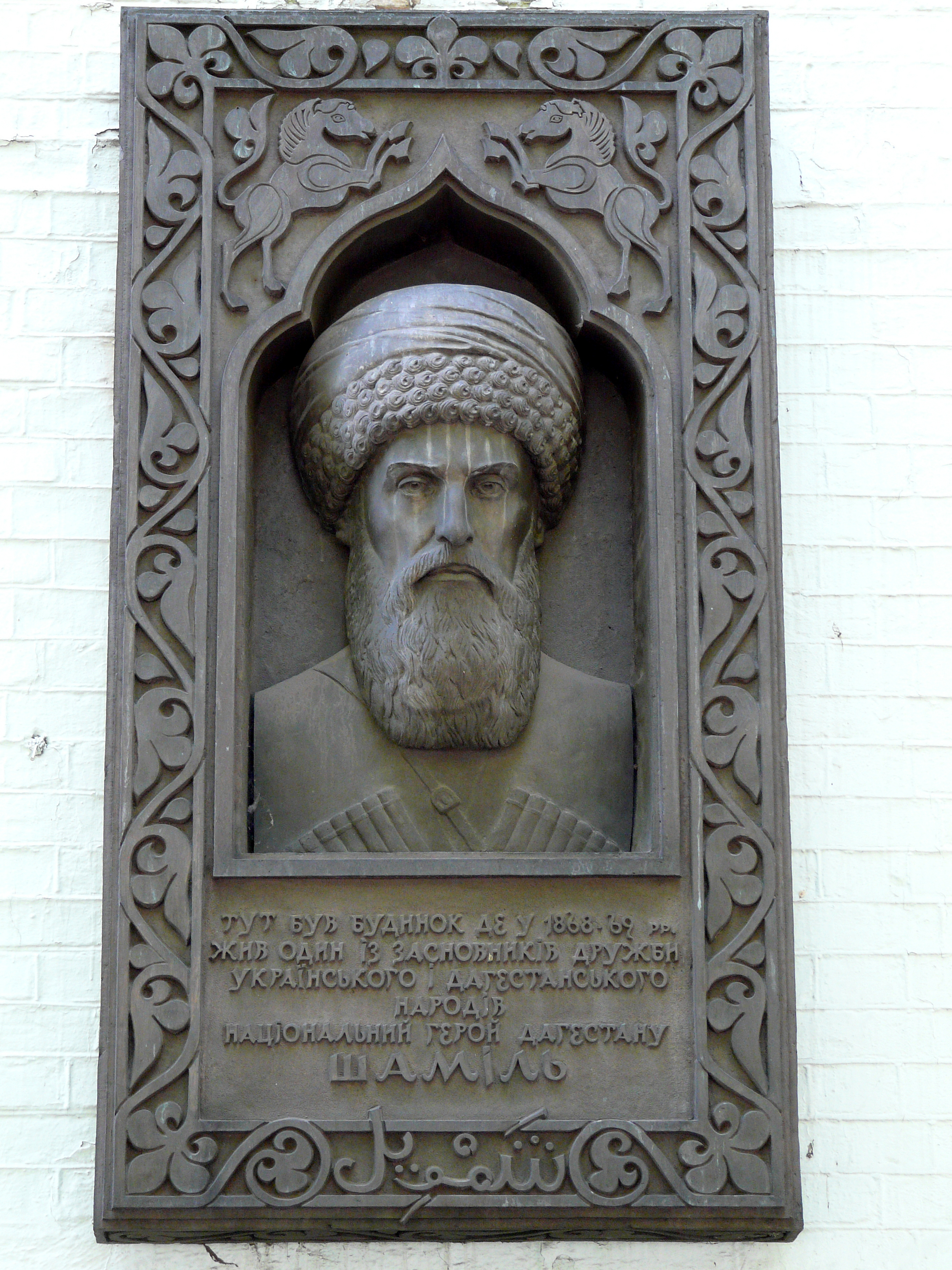 Будинок житлово-будівельного кооперативу «Арсеналець», Київ, Грушевського Михайла вул., 28/2